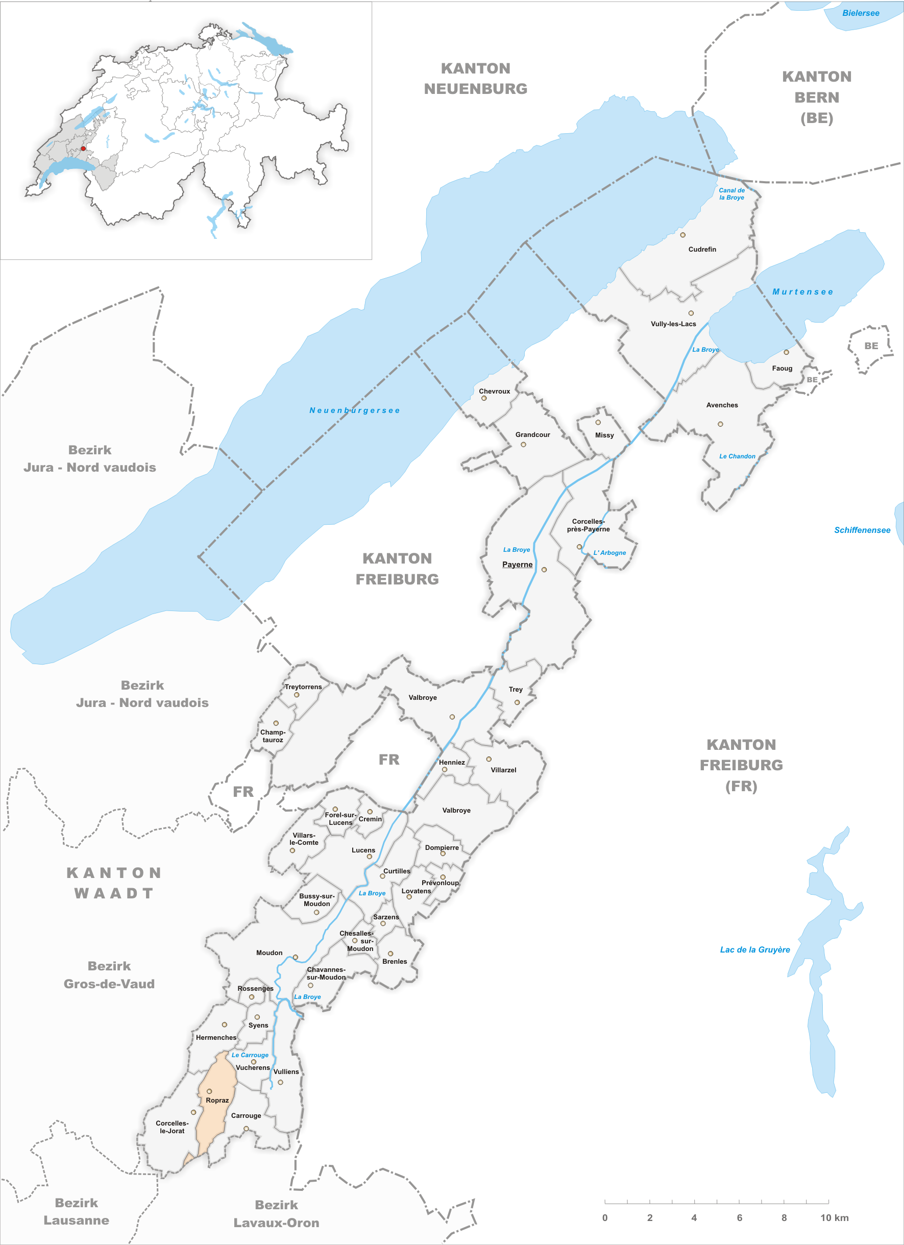 Municipality Ropraz